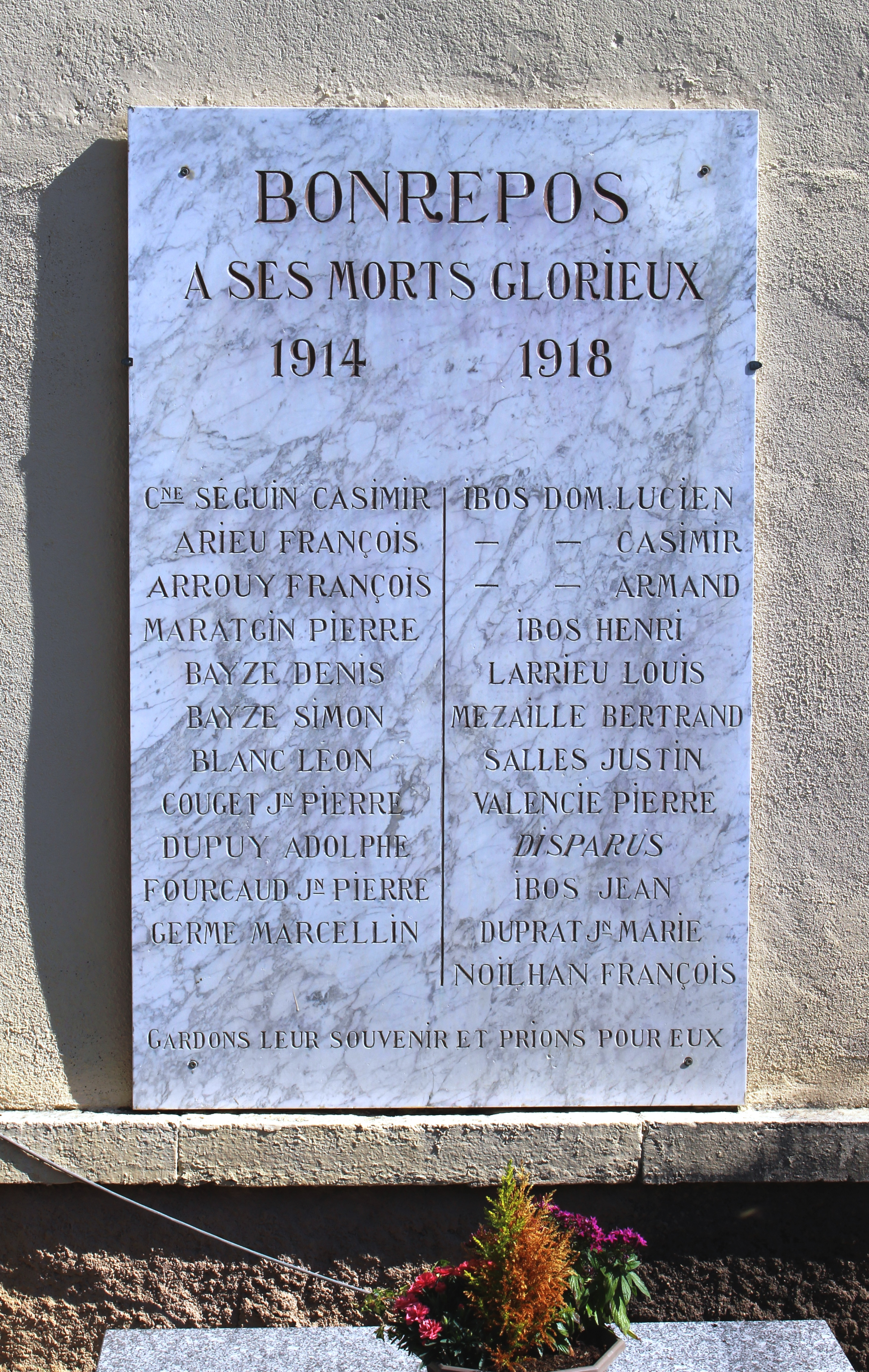 Monument aux morts de Bonrepos (Hautes-Pyrénées)